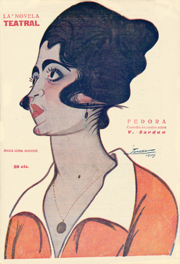 Caricatura de María Luisa Moneró.